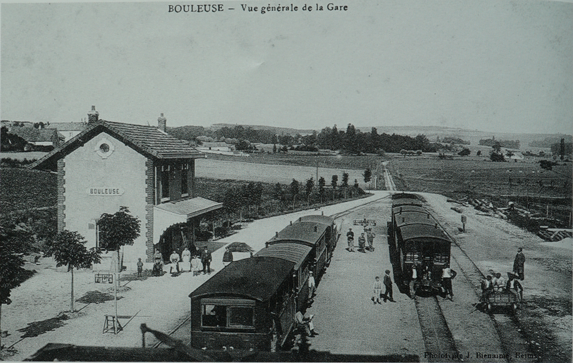 carte postale ancien.